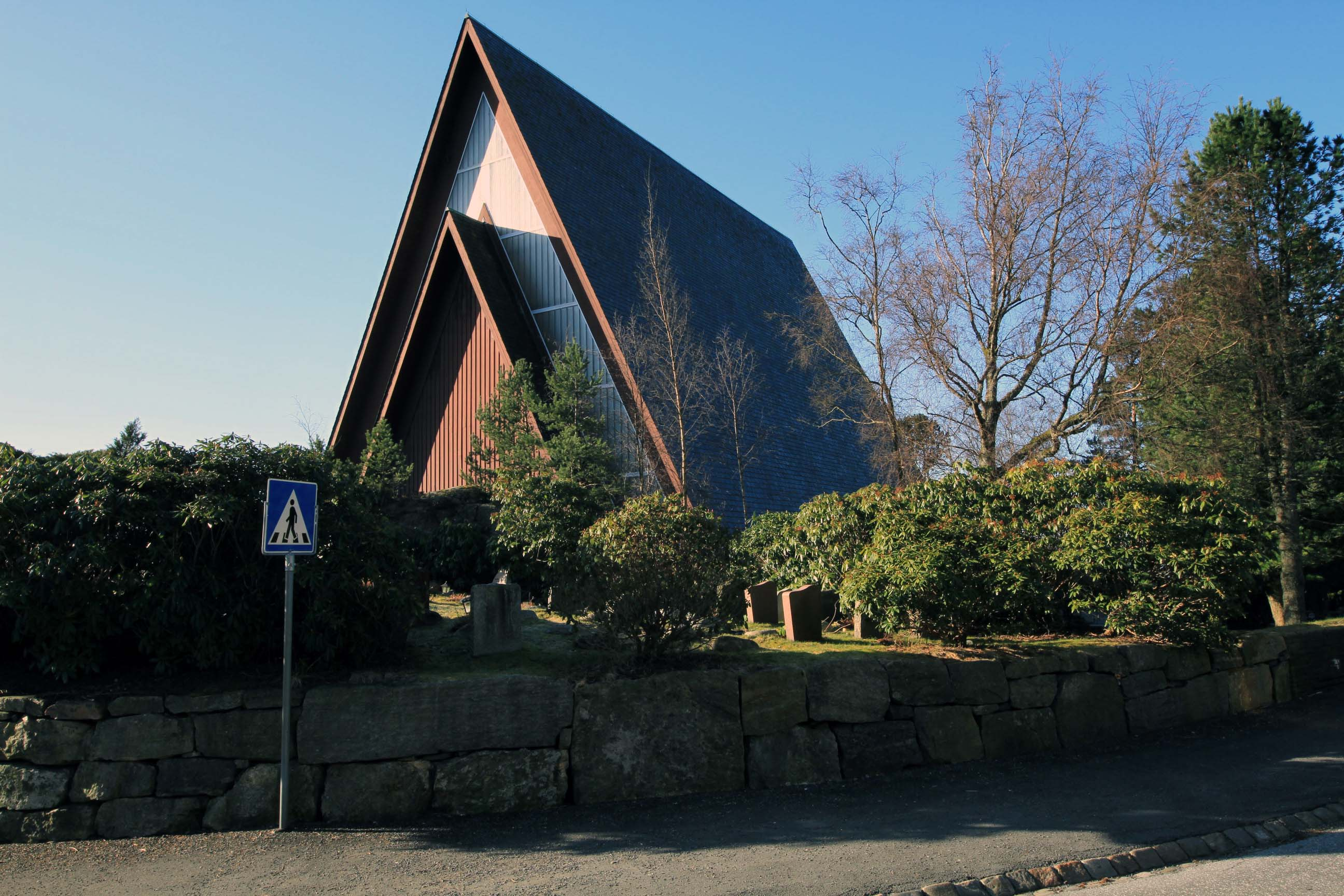 Biskopshavn